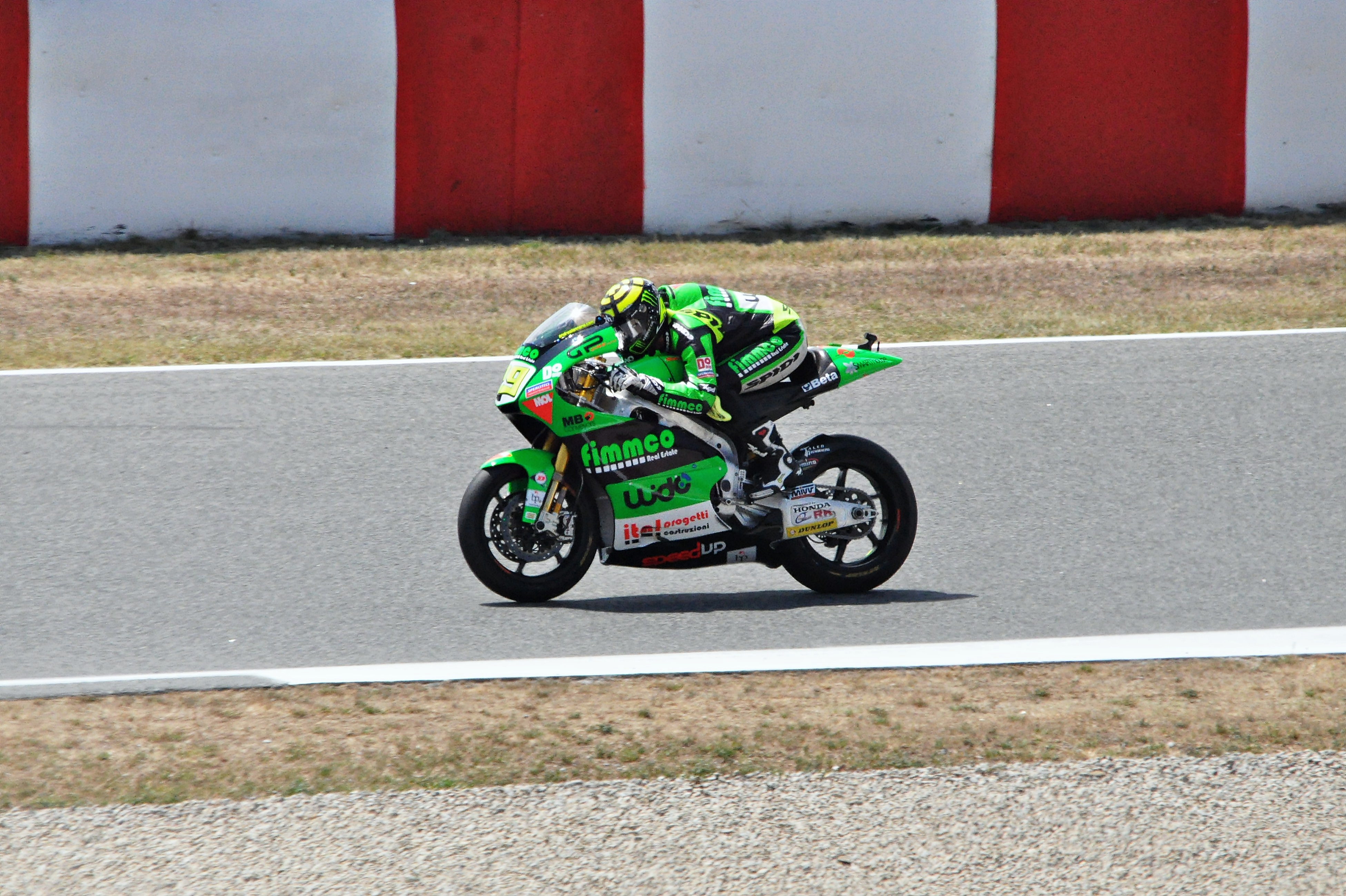 gran premio de cataluña-2010 moto2